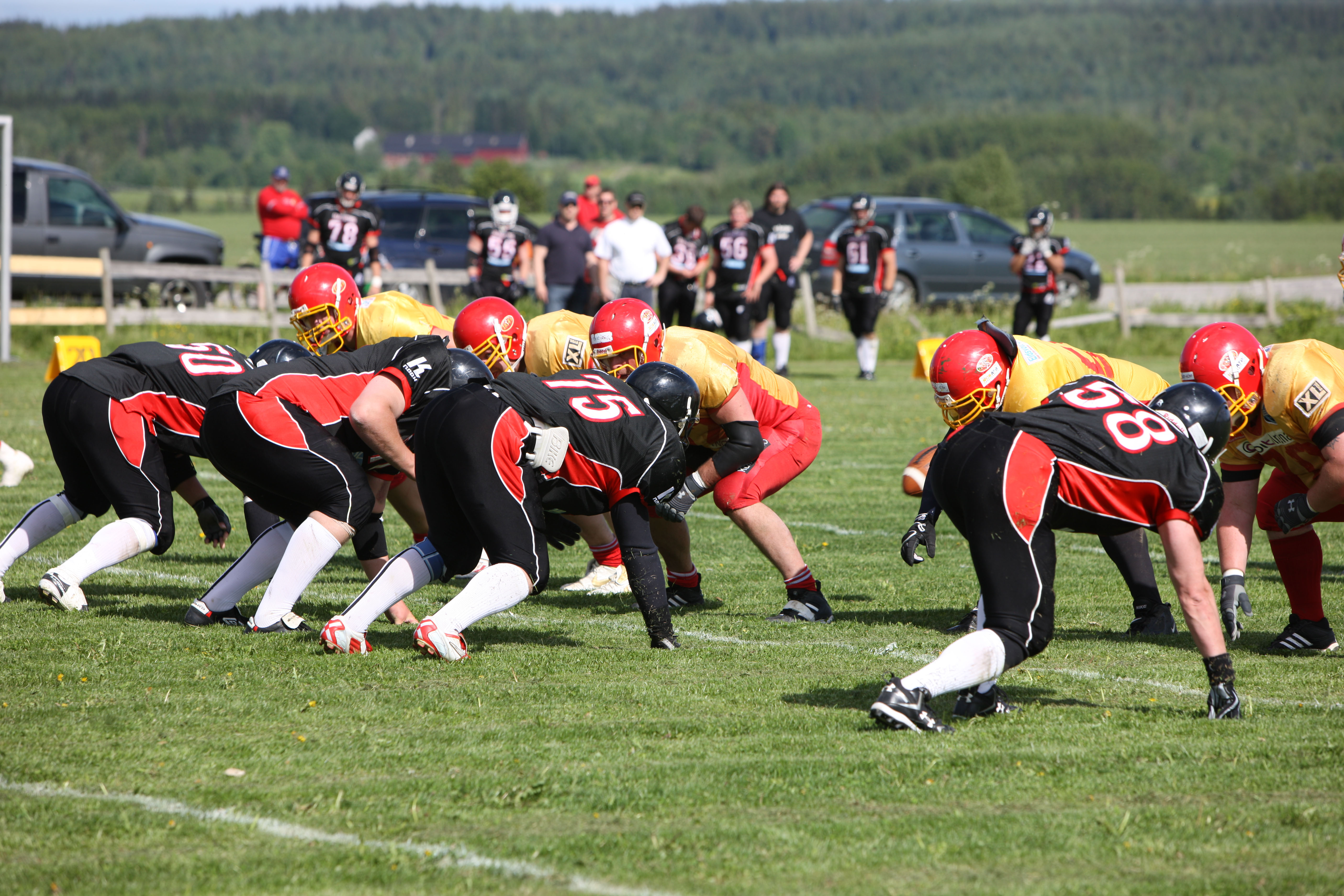 Eidsvoll 1814s Eidsvoll 1814s vs Kristiansand Gladiators 6. juni 2009